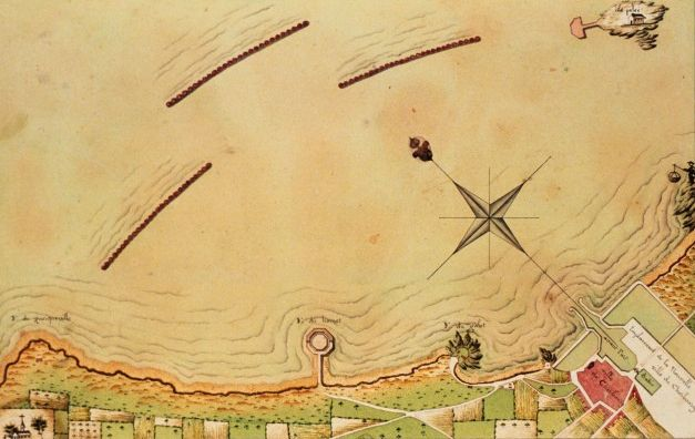 Plan de la rade de Cherbourg projeté par Louis-Alexandre de Cessart